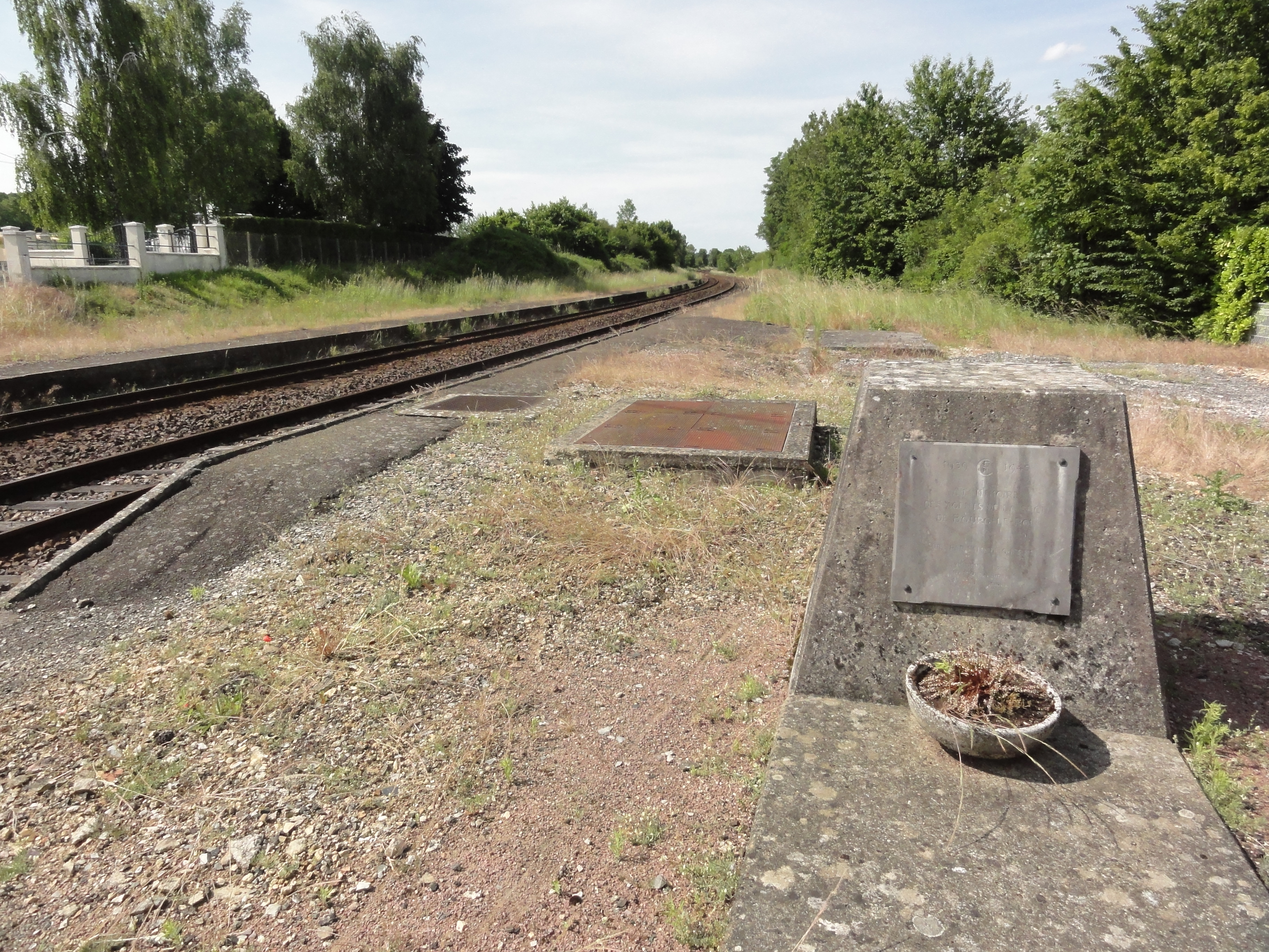 Chérisay (Sarthe) lieu-dit La Gare, anciens quais et mémorial de 1939-45